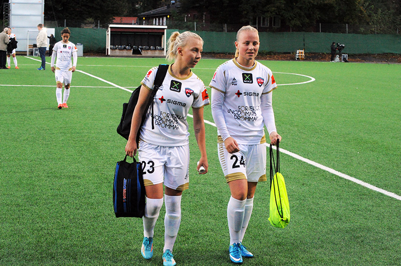 Nathalie Persson and Ebba Weider